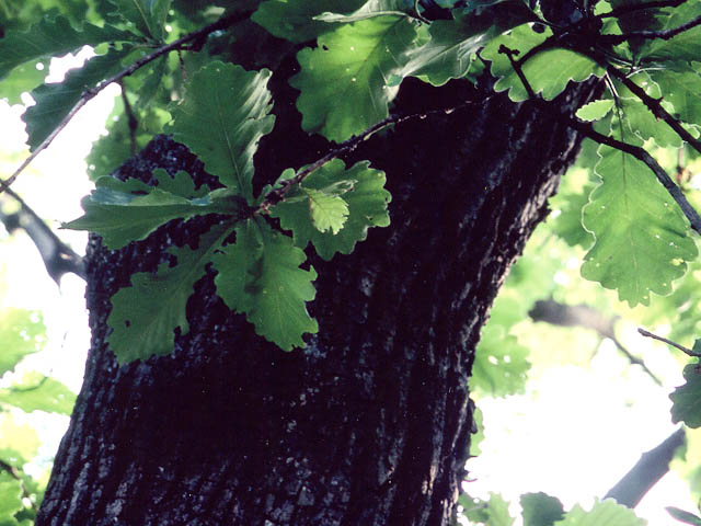 Quercus dentata una espesie de roble. Sus hojas se usan para envolver dulces "Kashiwa-Mochi". foto por usario Inti-sol en Tokyo, mayo de 2006. カシワの幹と葉。2006年5月、東京で撮影。